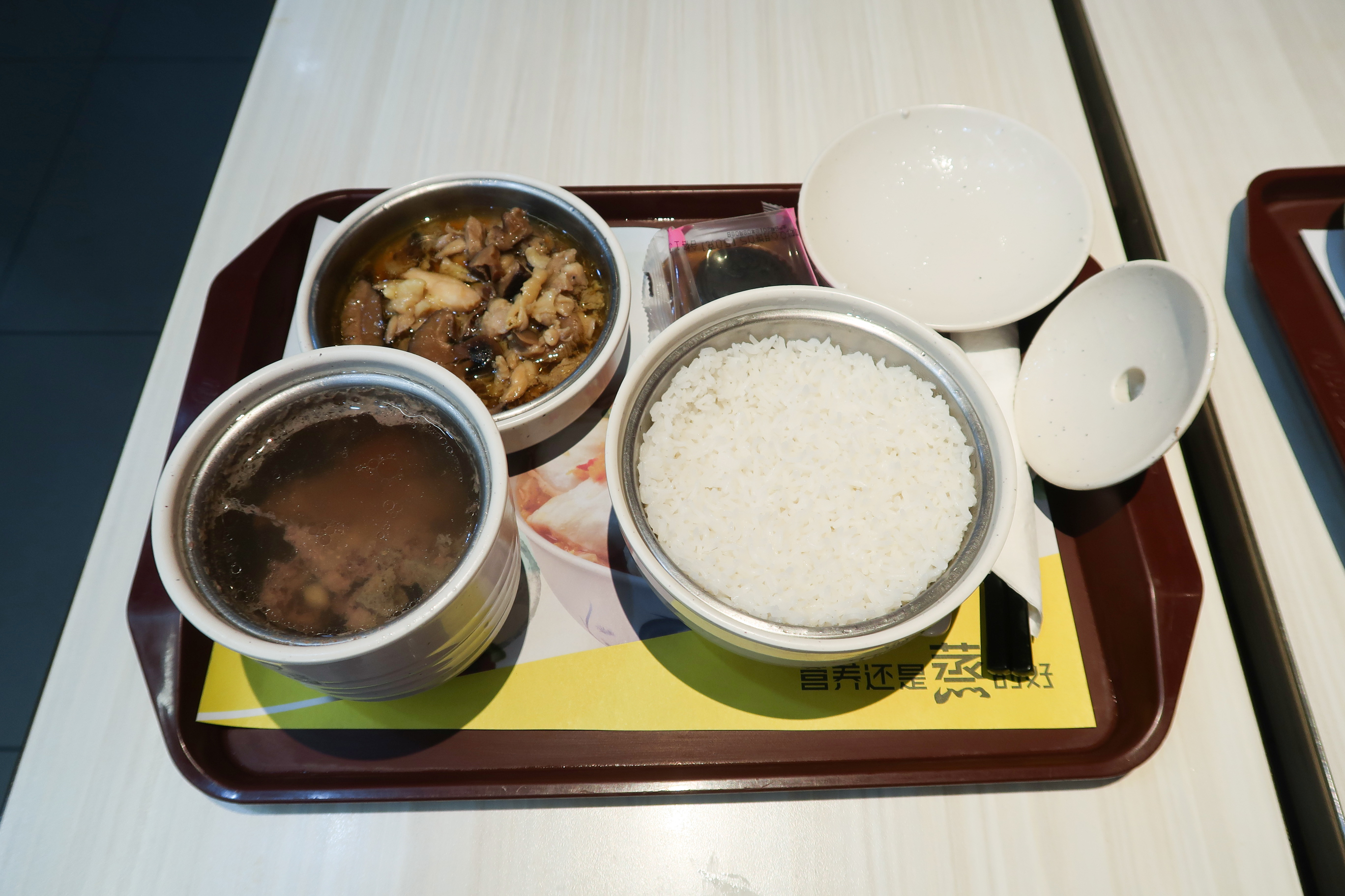 Kungfu restaurant food